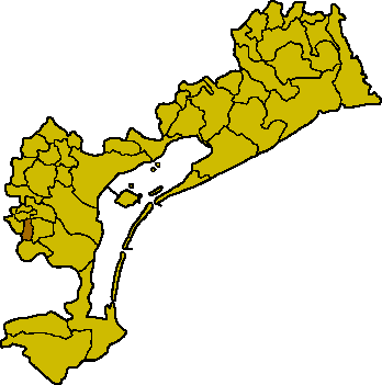 Ubicación del municipio de Fossò en el Venecia.